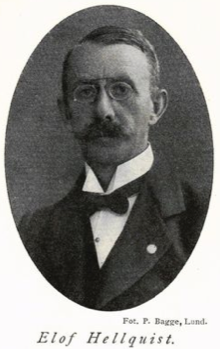 Elof Hellquist